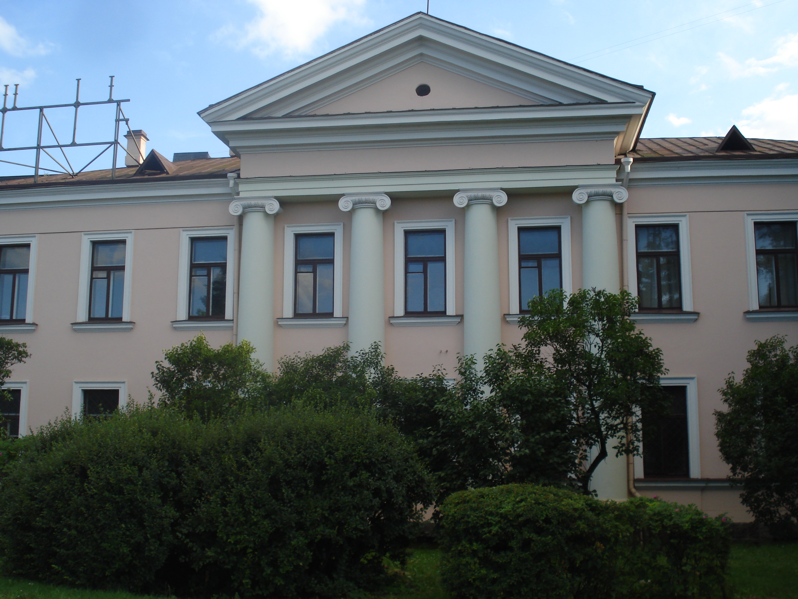 Palace of Polish Science Society in Vilnius (former ulica Mostowa, after WWI Lelewela 4, now Goštauto 1). Palac Towarzystwa Przyjaciol Nauk. Project by Marian Trojan (1913), columns 1929. Main fasade